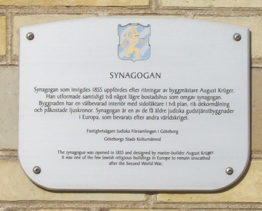 Inom Vallgraven 3:7, Göteborgs Synagoga, Göteborg. Informationsskylt. Plaketten sattes upp som en del av Göteborgs stads kulturnämnds "Projekt Husmärkning" kring åren 2000-2001 där drygt etthundra skyltar ingick. Se även boken "100 utmärkta hus i Göteborg". Vid en inventering av kommunen gjord 2016 satt 69 skyltar fortfarande uppe.